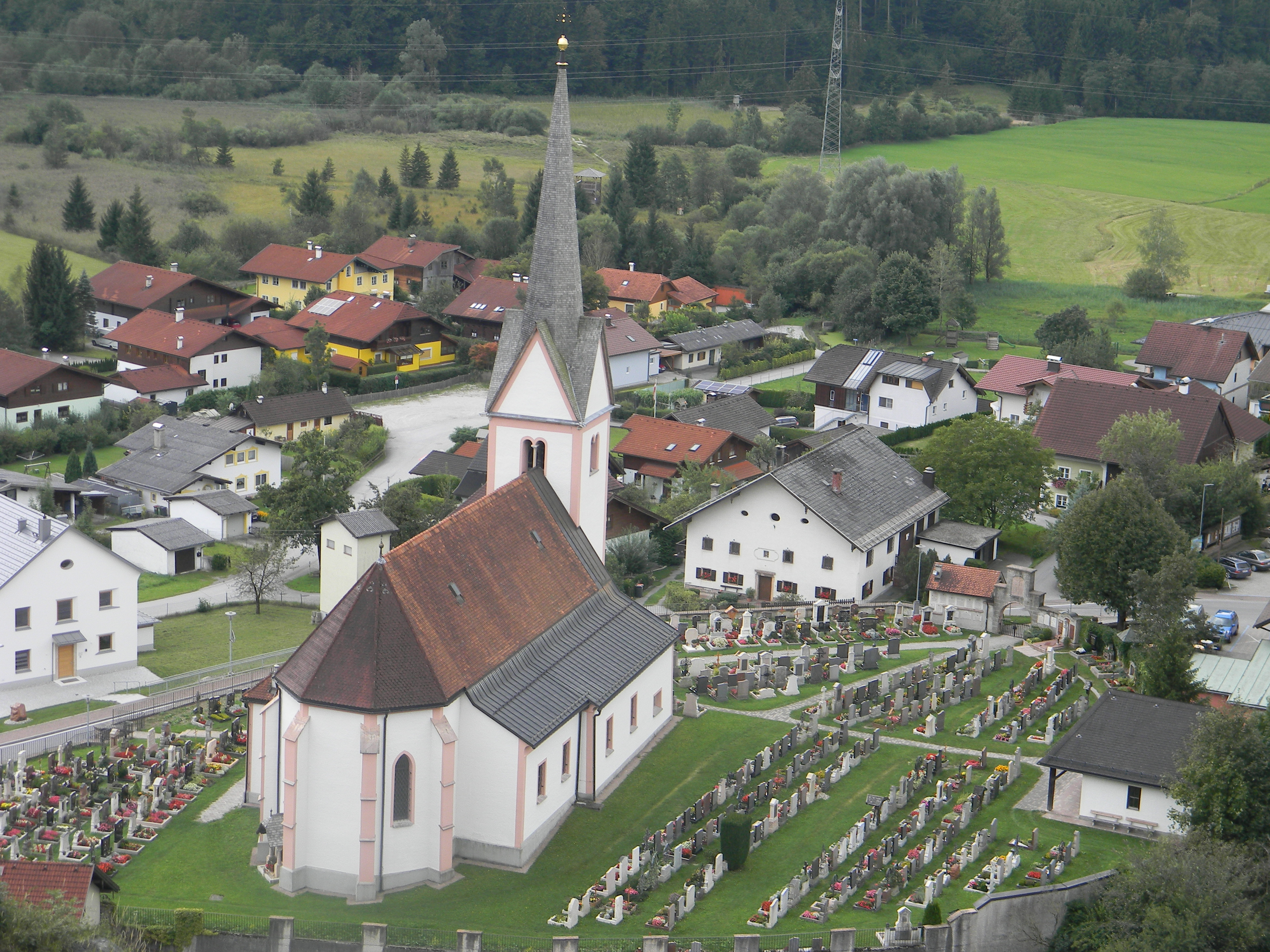 Friedhof Adnet mit Kirche zum Hl. Stefanus und Laurentius